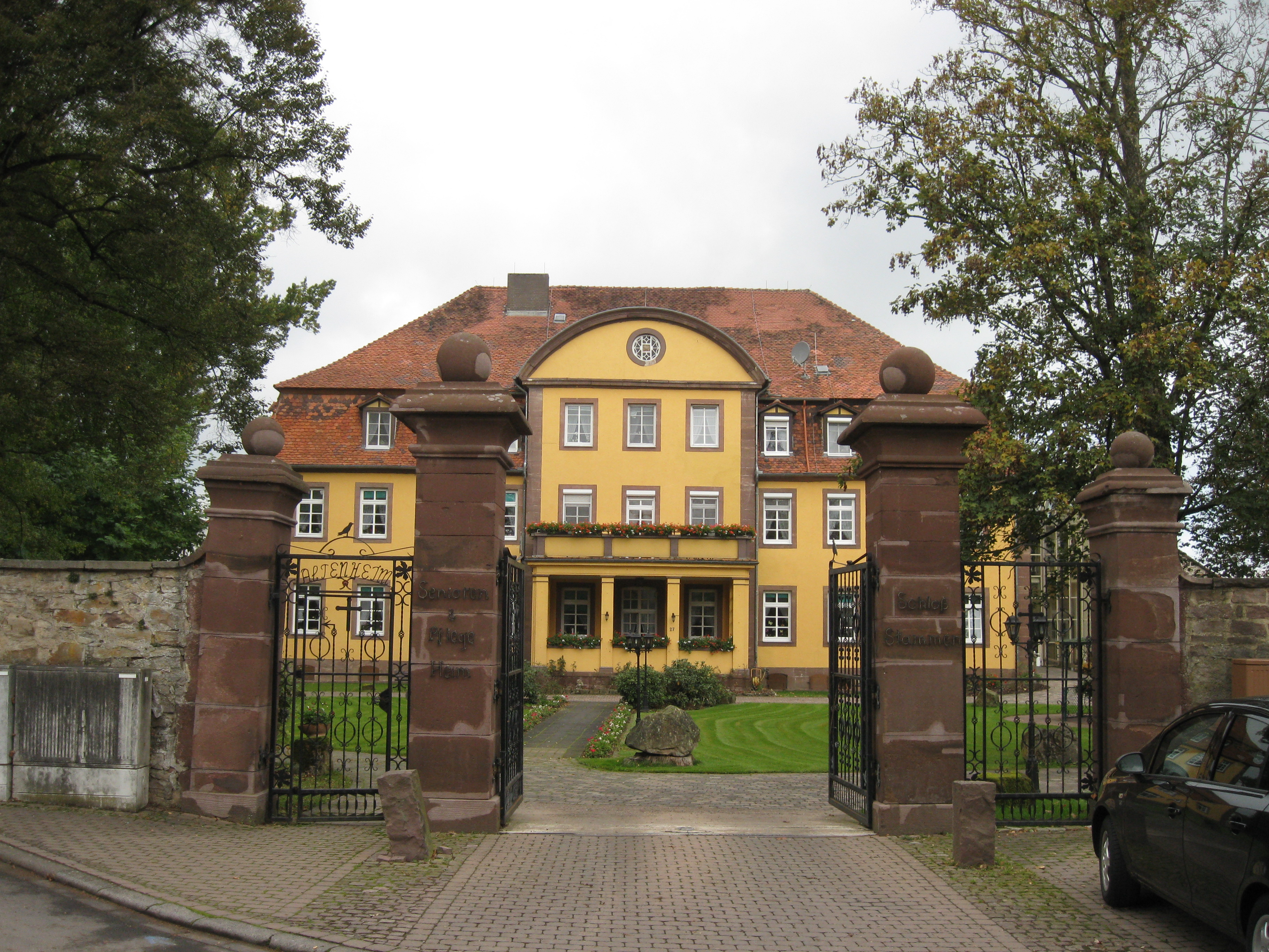 Herregård i Stammen ved Hofgeismar, Tyskland